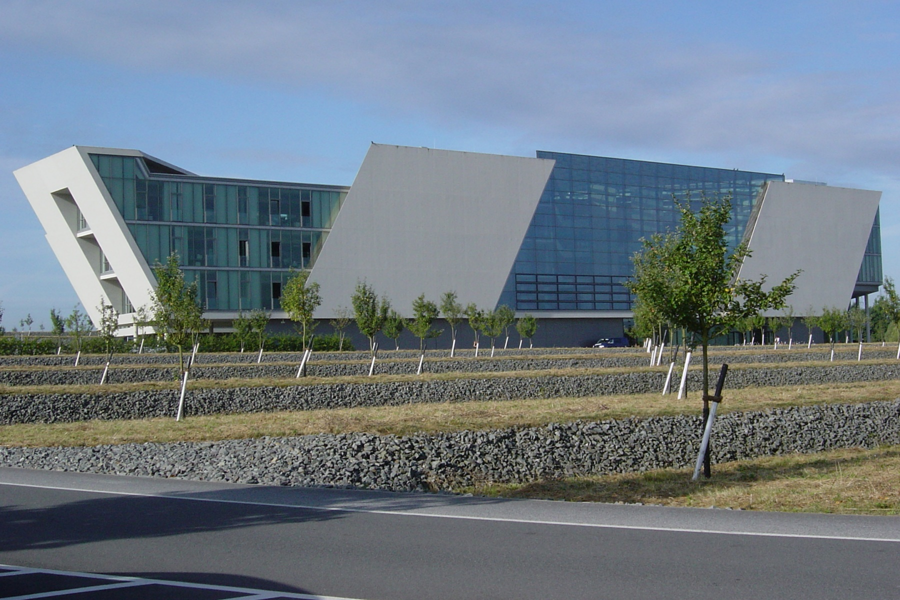 MobileLifeCampus (AutoUni Wolfsburg), Hermann-Münch-Str. 1, 38440 Wolfsburg